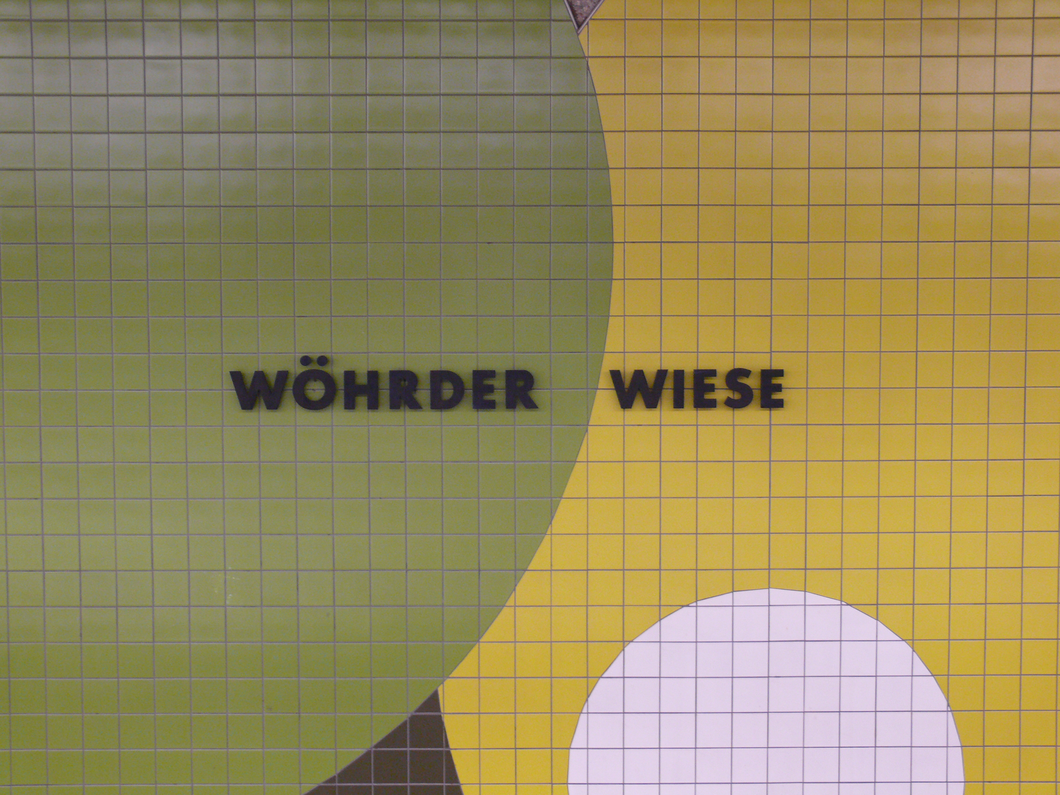 Stationsname an den Bahnsteigwänden am U-Bahnhof Wöhrder Wiese in Nürnberg.